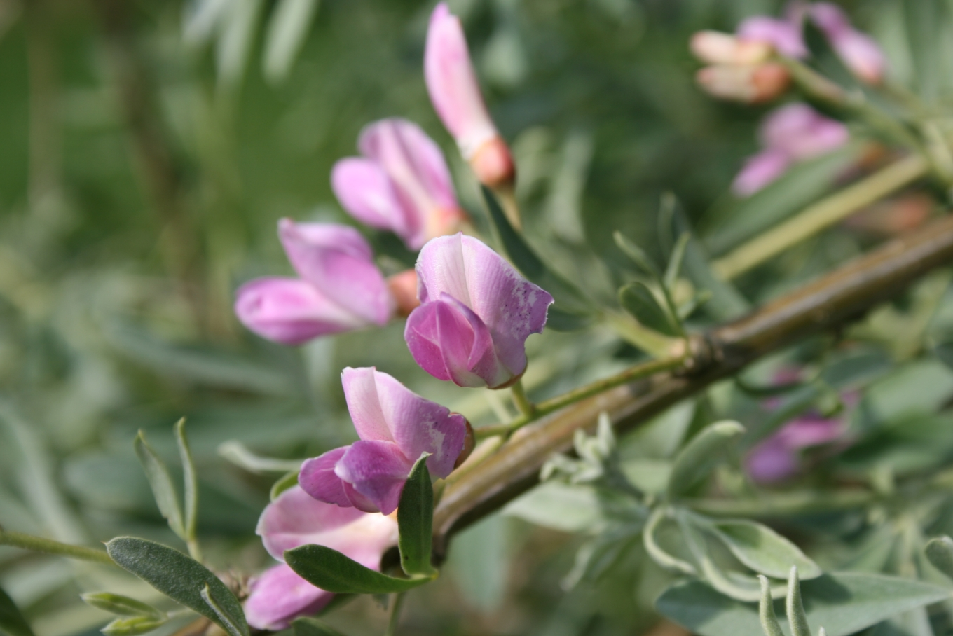 Halimodendron halodendron: Flower.